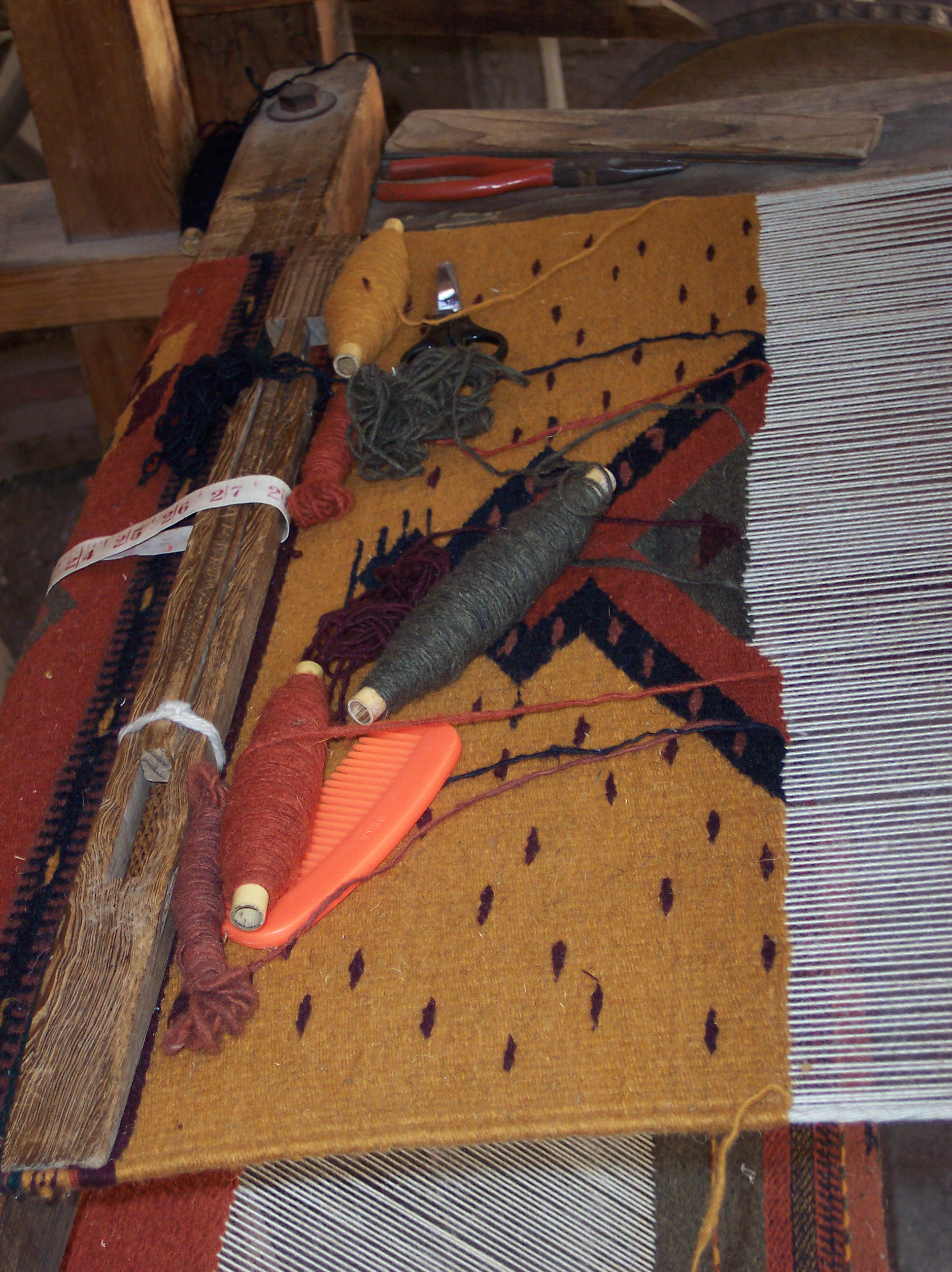 Coverlet in making process in Teotitlán del Valle town. SPANSIH: Tapete en proceso de fabricación. Located in: Teotitlán del Valle, Oaxaca. Mexico.